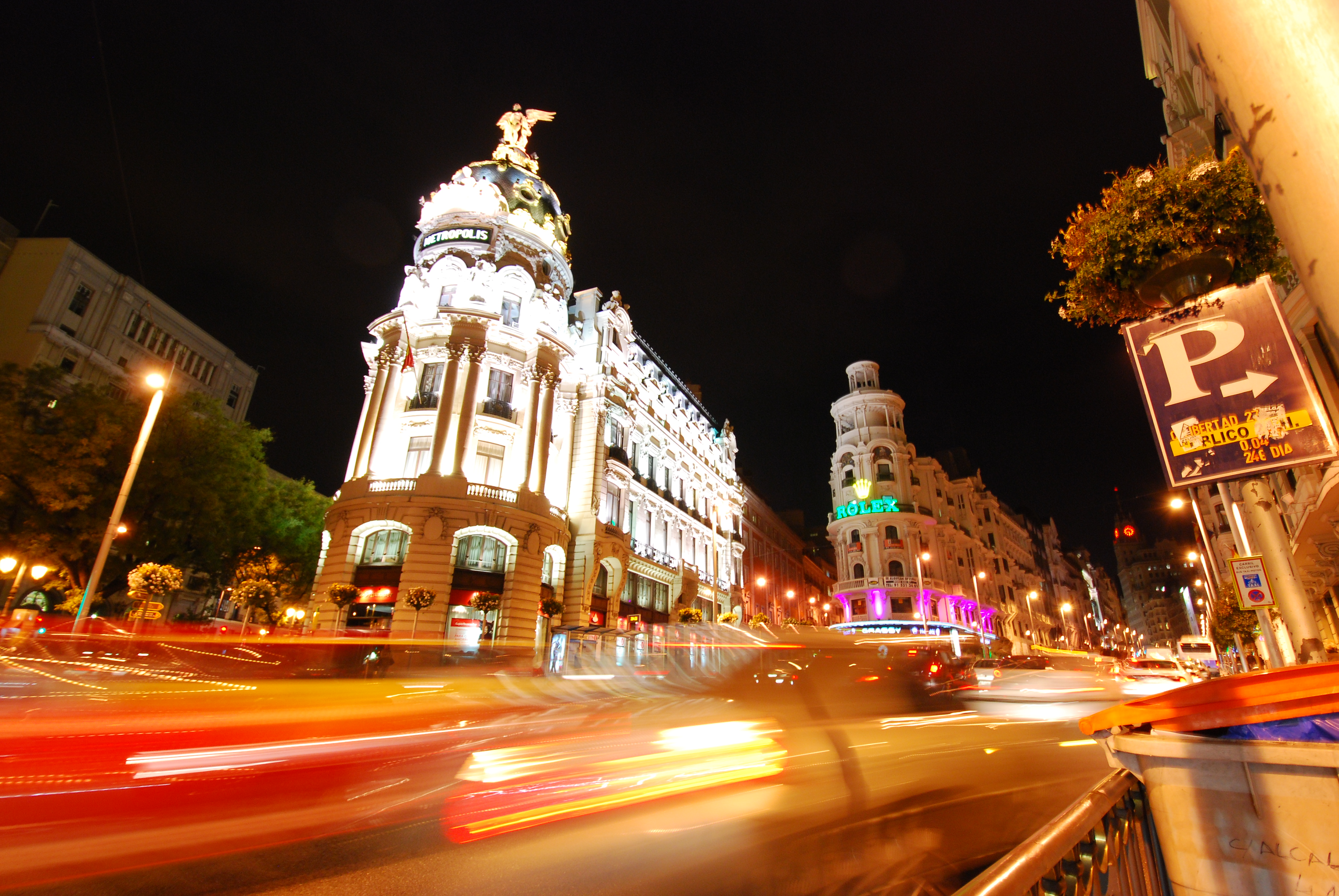 Confluencia de las calles Alcalá y Gran Vía, Madrid